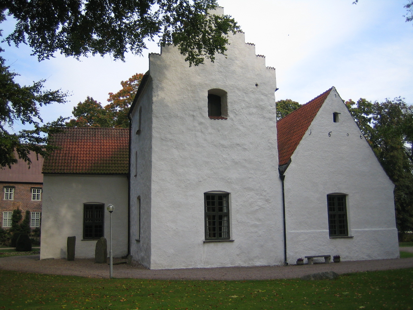 Trolle-Ljungby kyrka i Skåne